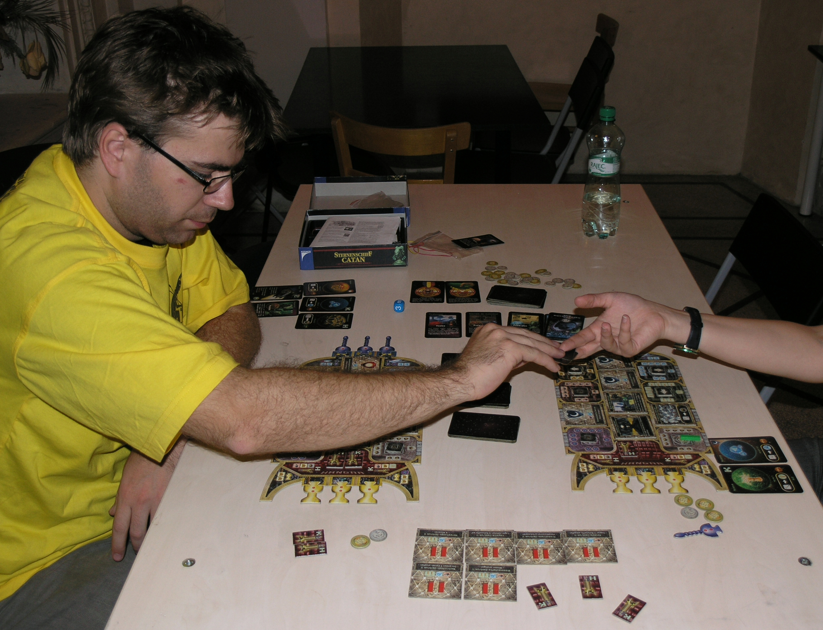 Deskohraní 2008